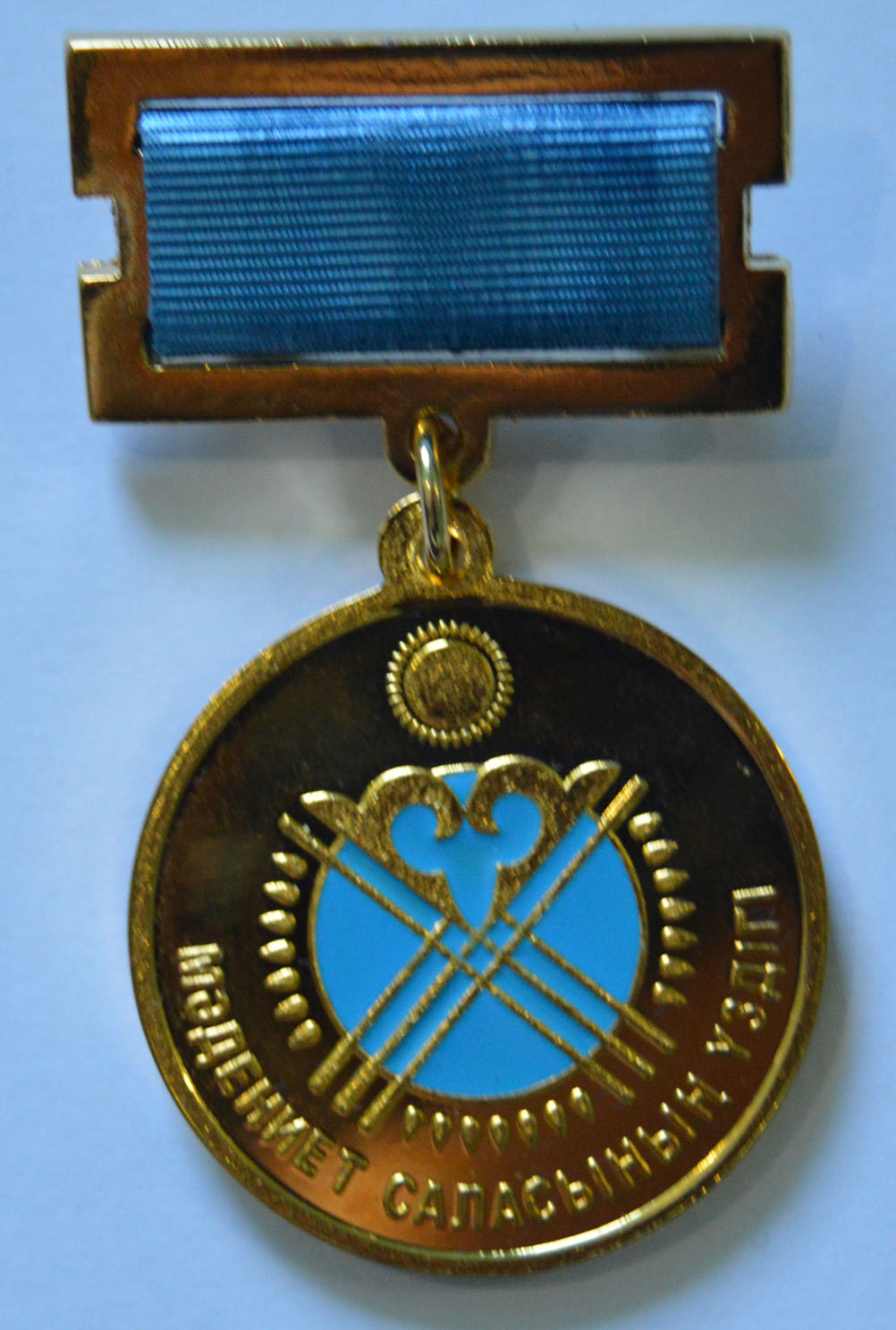 Нагрудный знак "Отличник культуры"